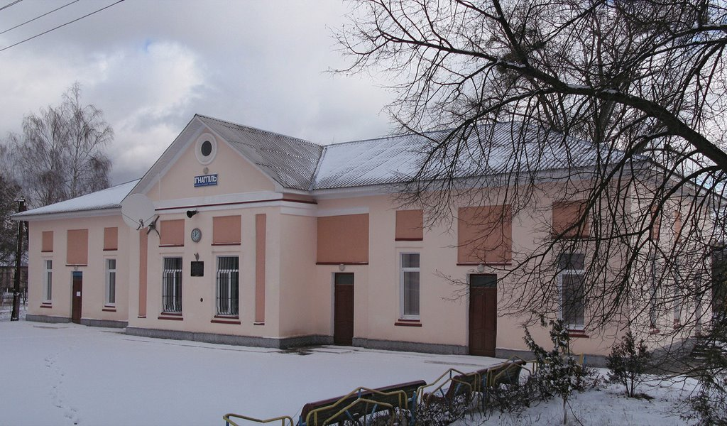 Вокзал станції Ігнатпіль